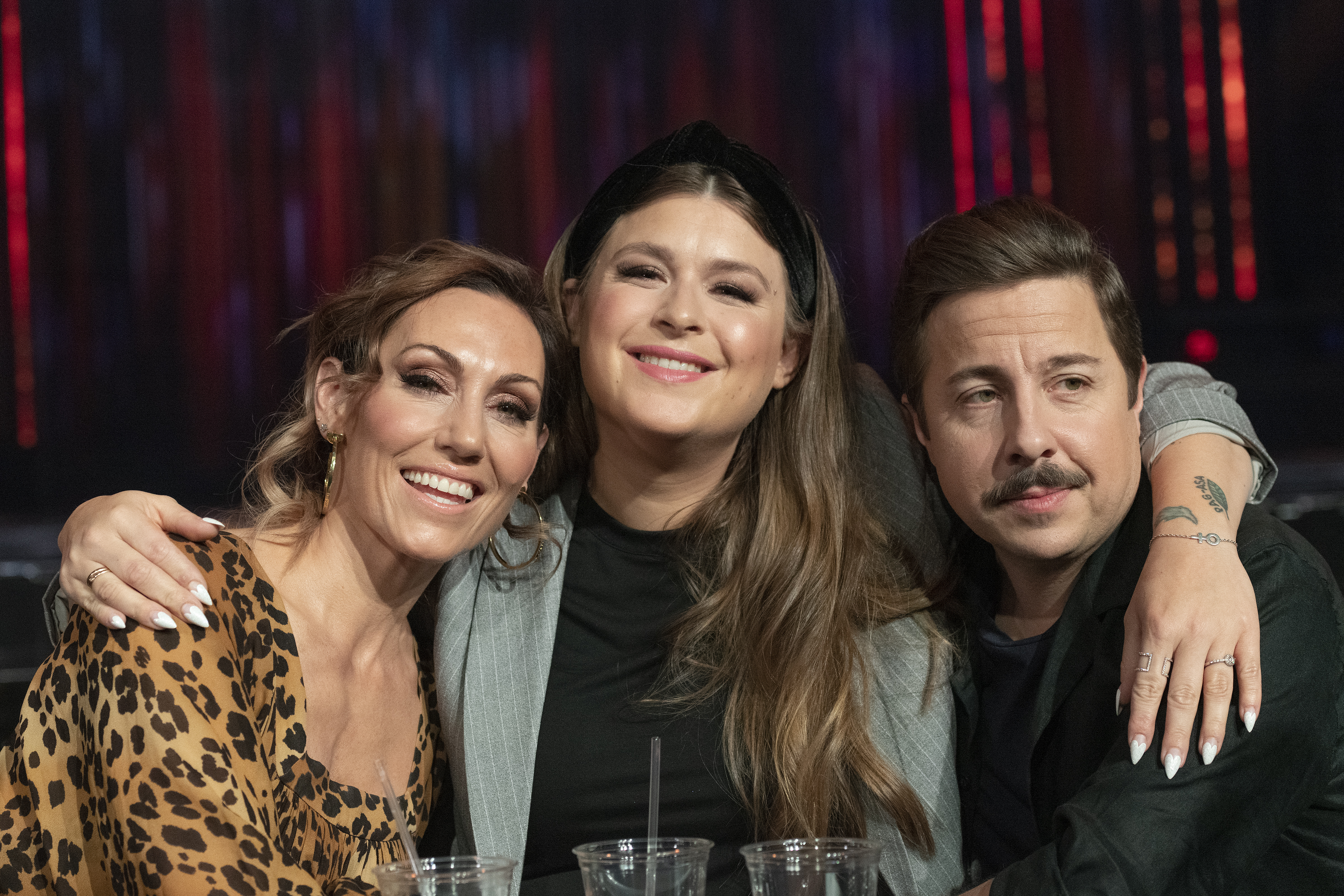 Programledare Melodifestivalen 2020 Linköping